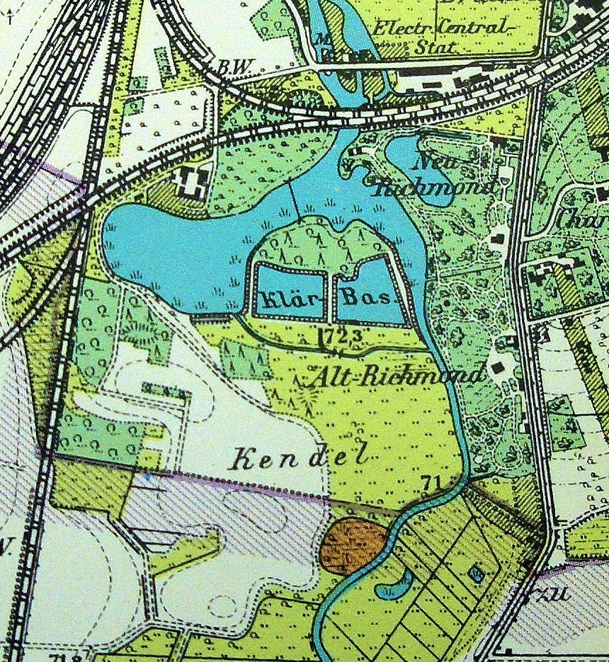 Ausschnitt aus dem Ortsbauplan Braunschweigs von 1899, Flurbezeichnungen fehlen, die Bezeichnung "Kendel" soll "Kennel" heißen und bezieht sich ursprünglich auf das Gebäudeensemble im Nordosten am Bahndamm ("Herzogliche Meierei".